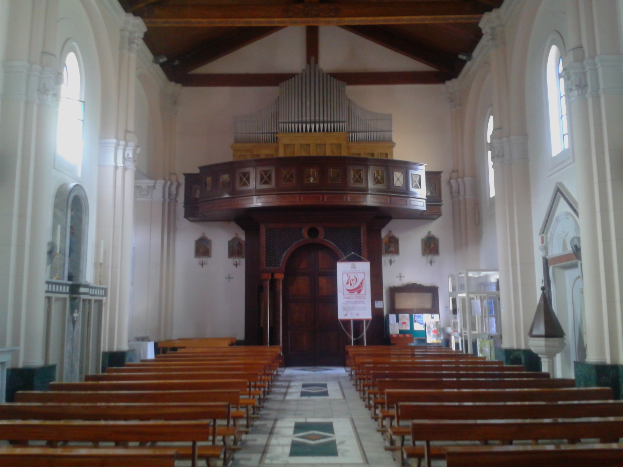 Cantoria chiesa del Rosario di Palmi